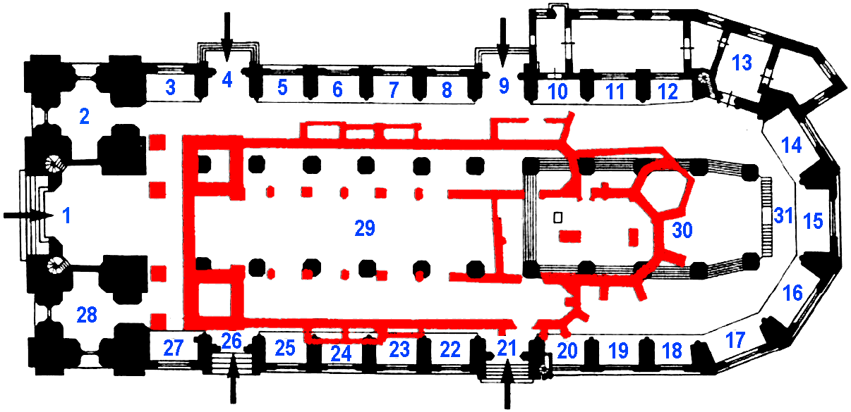 Von der historischen Kirche zu unserer lieben Frau und einem Speicherbau lagen noch Mauerreste unter der heutigen Kirche; sie wurden während des Wiederaufbaus nach dem Zweiten Weltkrieg untersucht und eingemessen. Aus diesen Befunden lässt sich die Gestalt der ersten Frauenkirche rekonstruieren: Sie war etwas größer angelegt als die damalige Pfarrkirche der Stadt, St. Peter. Dies ist der von Walter Haas für das Diözesanmuseum in Freising rekonstruierte Grundriss des Vorgängerbaues der Frauenkirche in roter Farbe. Der aktuelle Grundriss ist schwarz gefärbt. Die schon vorher vorhandenen Nummern zur Identifizierung einzelner Gebäudeteile wurden am 24. September 2016 in gleicher Anordnung durch größere blaue Ziffern ersetzt: 1 = Hauptportal, 4 = Sixtusportal, 9 = Bennoportal, 13 = Sakramentskapelle, 21 = Donatus- = Brautportal, Arsacius-/ArsatiusPortal